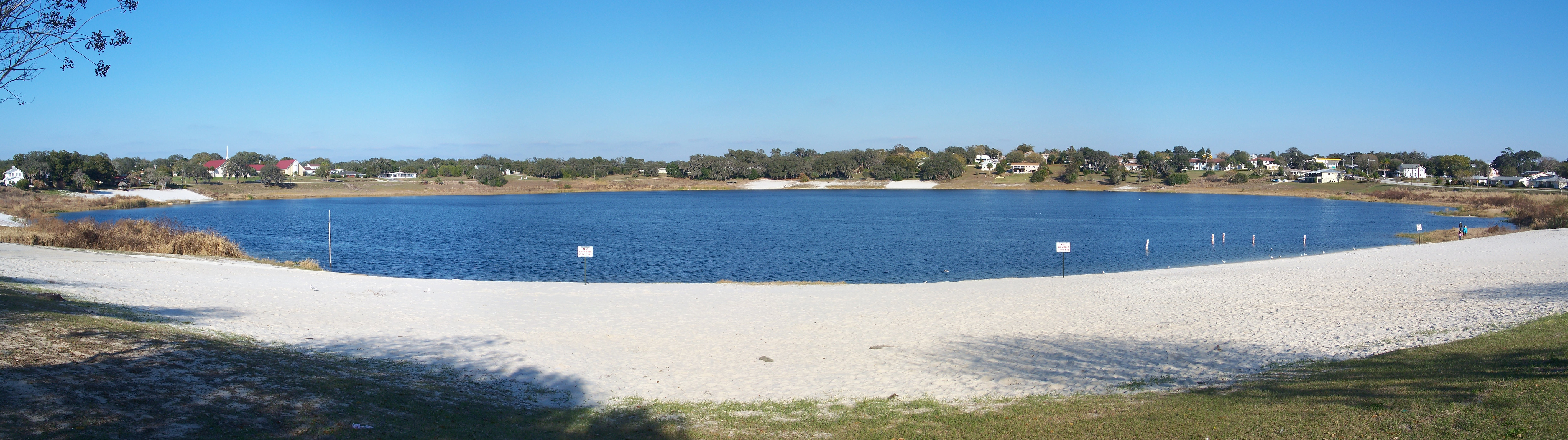 Avon Park, Florida: Lake Verona